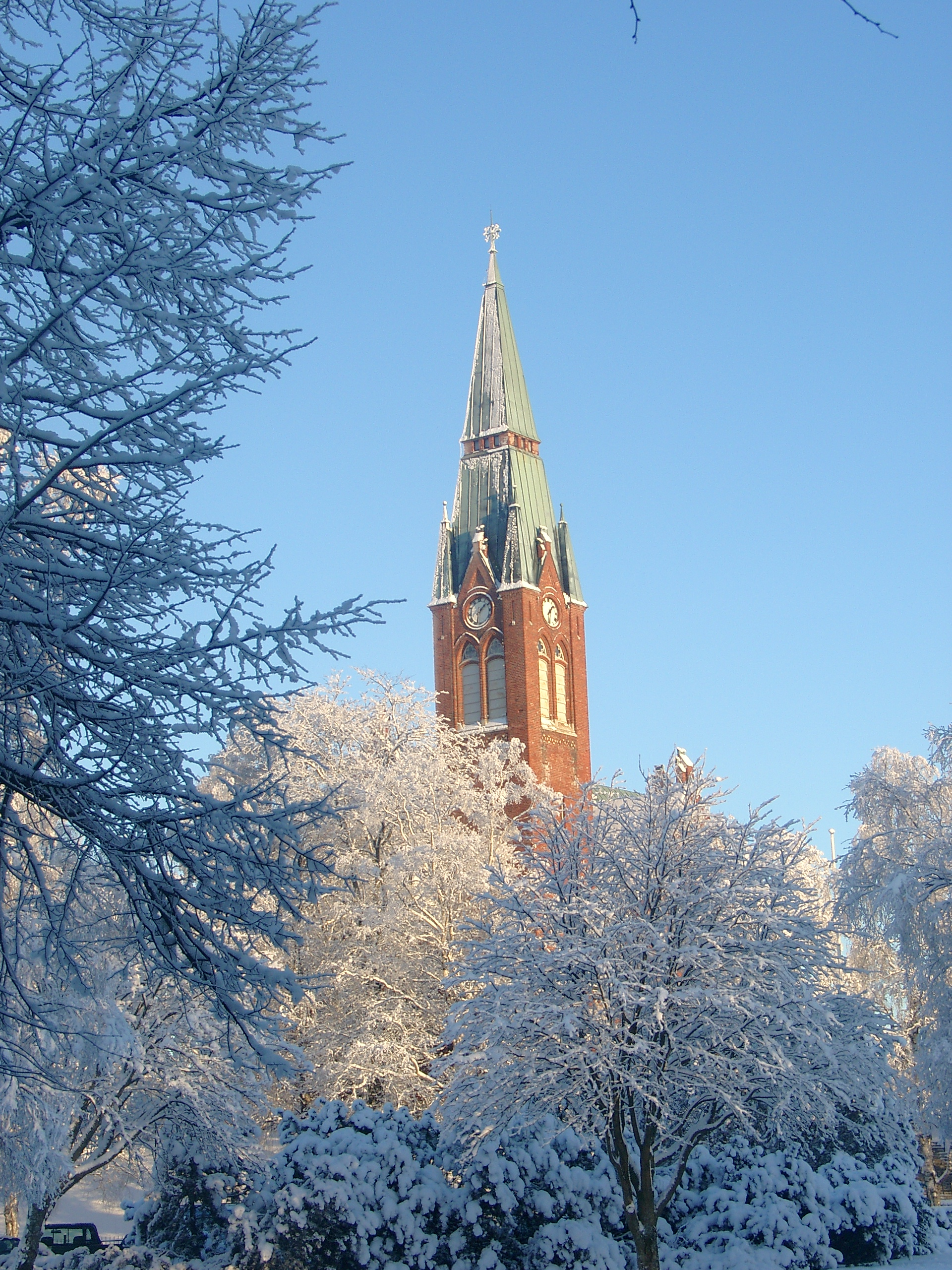 Forssan kirkko